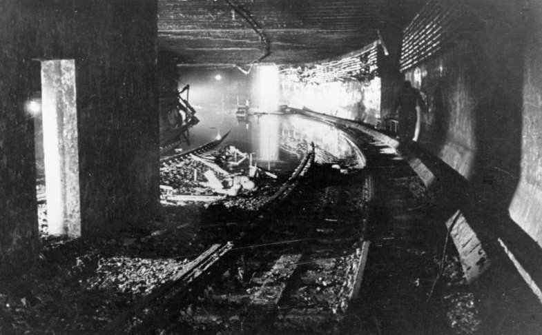 Berlin, gesprengter S-Bahn-Tunnel ADN-ZB / Archiv, Berlin Am 2.5.1945, dem Tag der Kapitulation Berlins, sprengte die SS den Tunnel der Nord-Süd-S-Bahn am Landwehrkanal hinter dem Anhalter Bahnhof. Die im Tunnel zwischen Potsdamer Platz und Oranienburger Tor als Behelfslazarett abgestellten Wagen wurden durch die Sprengung überflutet, viele Menschen ertranken. Aufn. 1946 Information added by Wikimedia users.